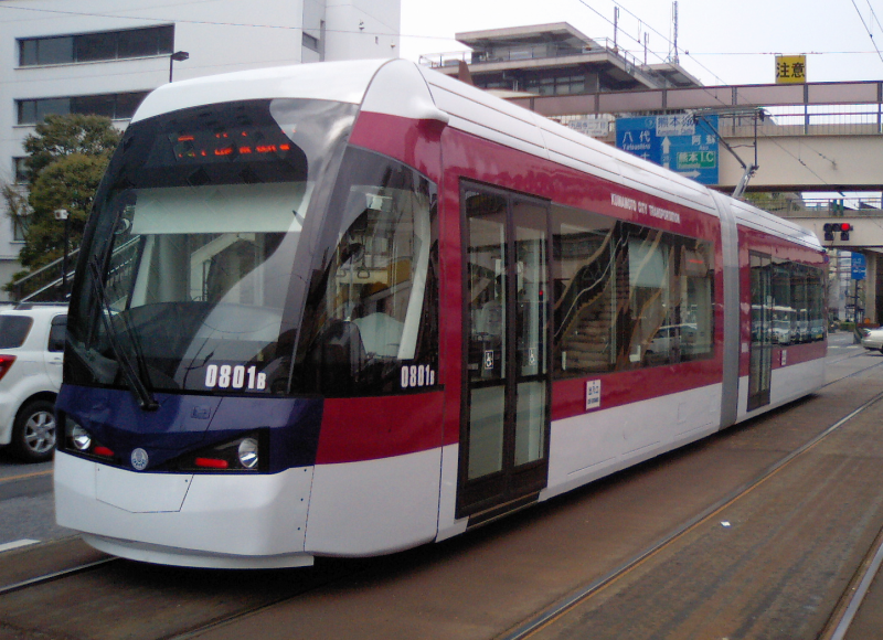 熊本市電0801AB (九品寺交差点電停)